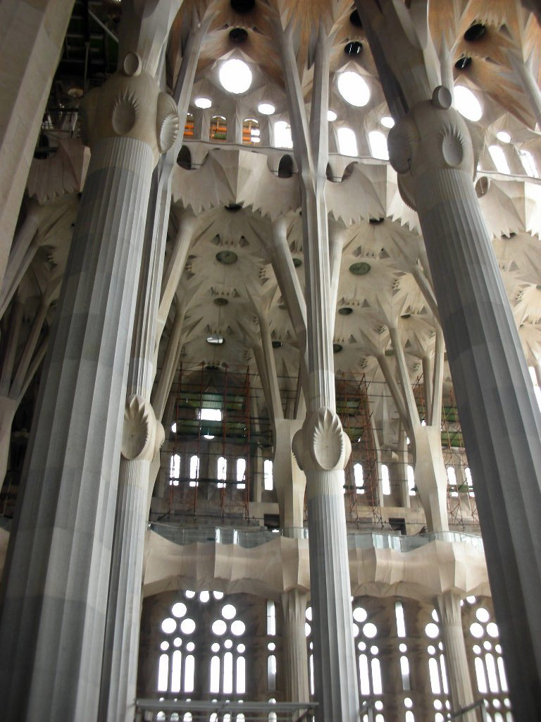 Interior del Templo Expiatorio de la Sagrada Familia en Barcelona